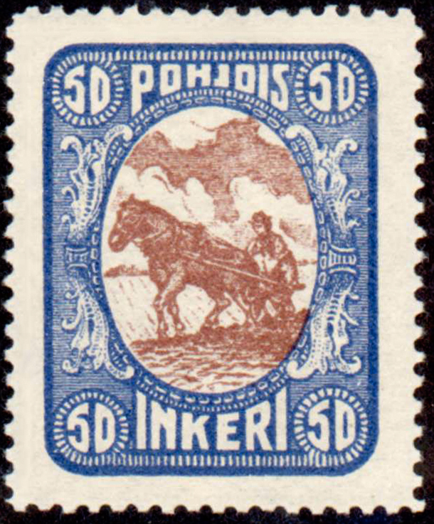 Почтовая марка Северной Ингрии (Ингерманландии) второго выпуска, 1920